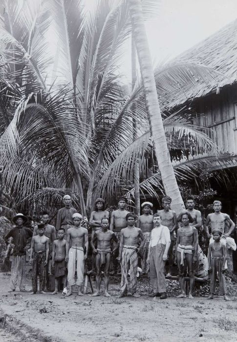 foto. Groepsportret met Dajaks in Moearatewe